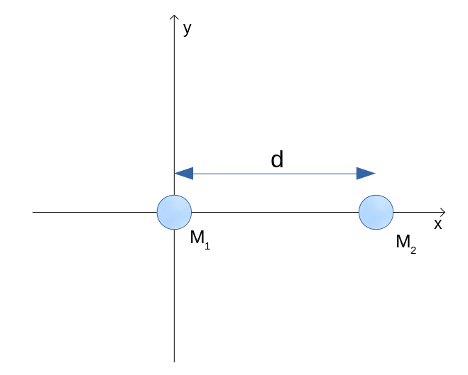 Localização do Centro de Massa em um Sistema que possui duas partículas, que foram desenhadas simbolicamente para analisar o ponto de equilíbrio entre elas em uma determinada distância.